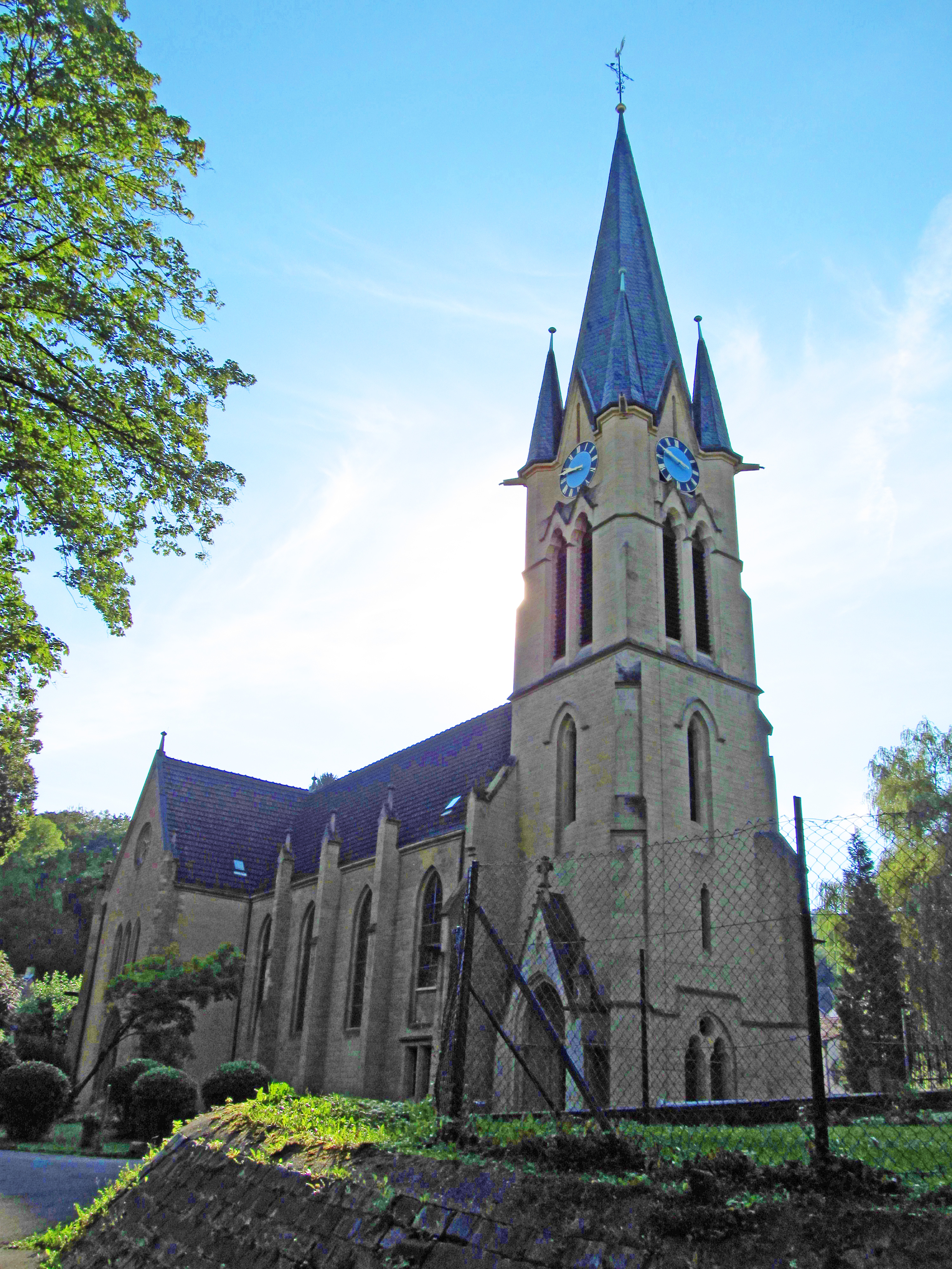 Die Evangelische Kirche in Sulzbach, Saarland